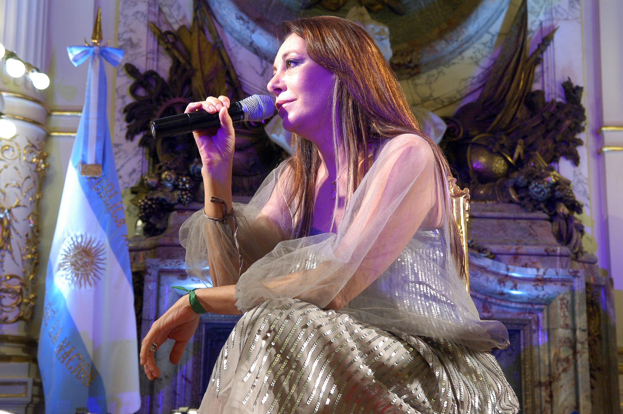 La cantante Adriana Varela brindó un recital en la Casa de Gobierno en el marco del ciclo "Música en el Salón Blanco".